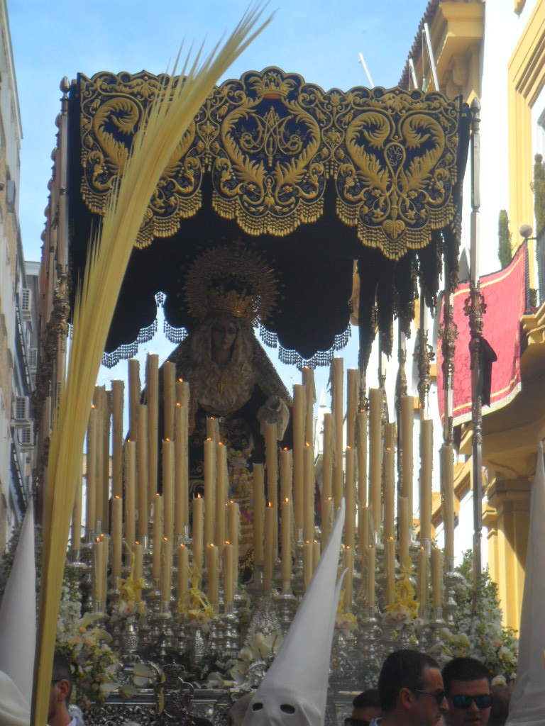 Virgen de la palma